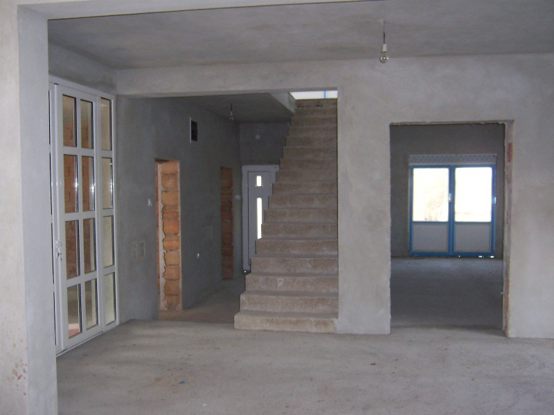 Innenansicht eines Hausrohbaus